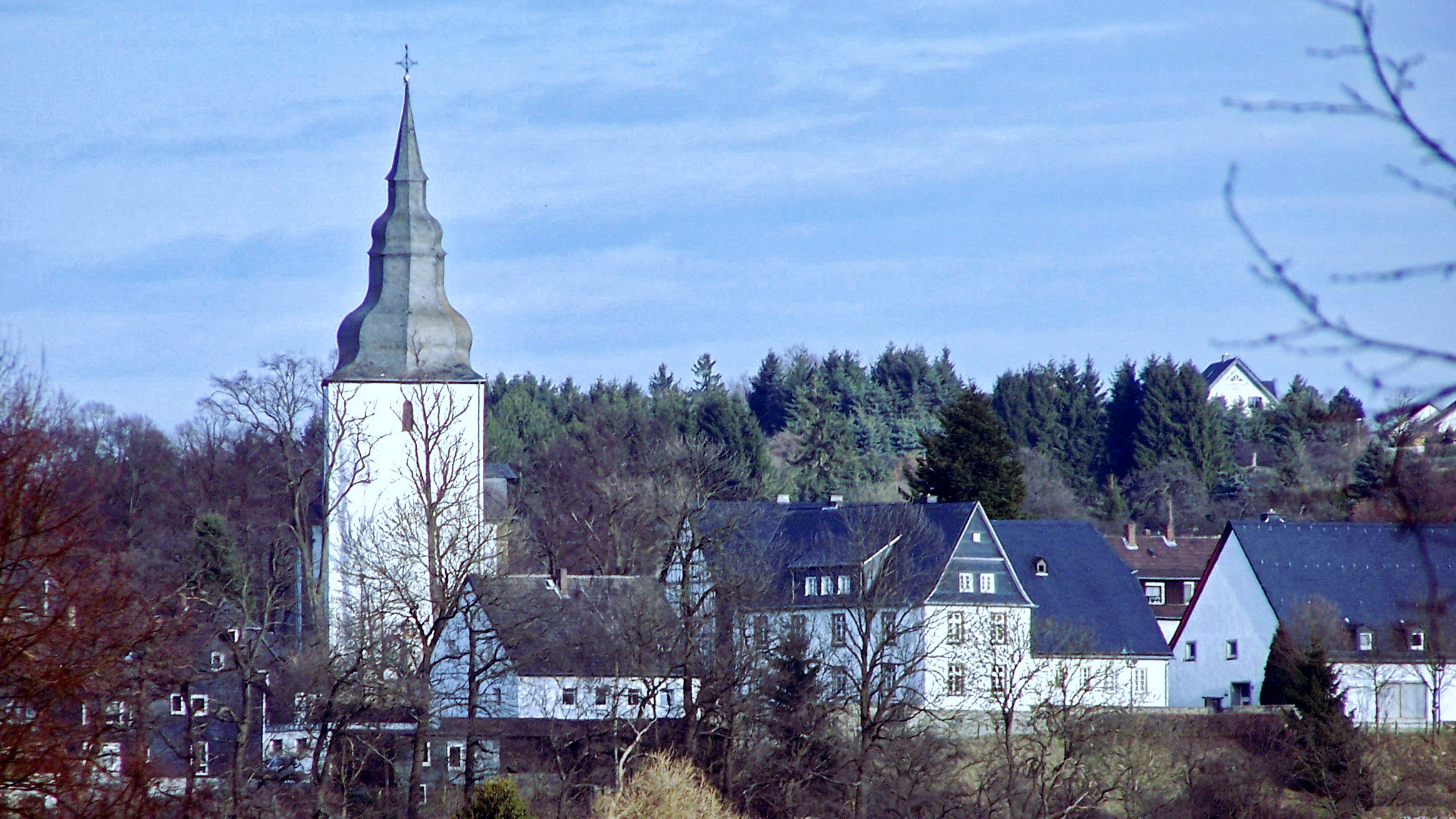 Altstadt und Propsteikirche von Belecke (Warstein); Teleaufnahme vom Lodenweg aus This image shows a heritage building in Germany, located in the North Rhine-Westphalian city Warstein (no. A II 1).